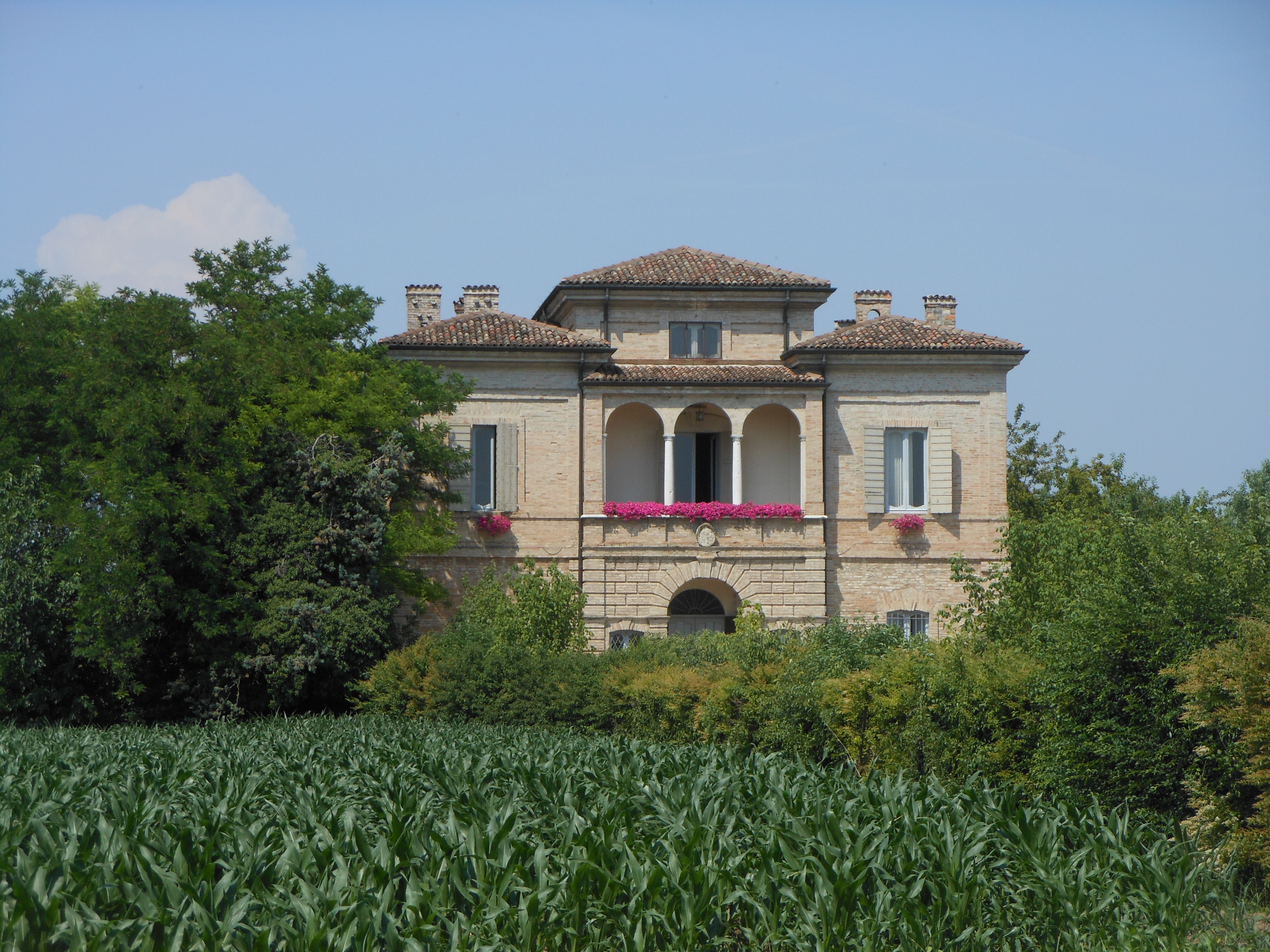 Palazzo Beffa